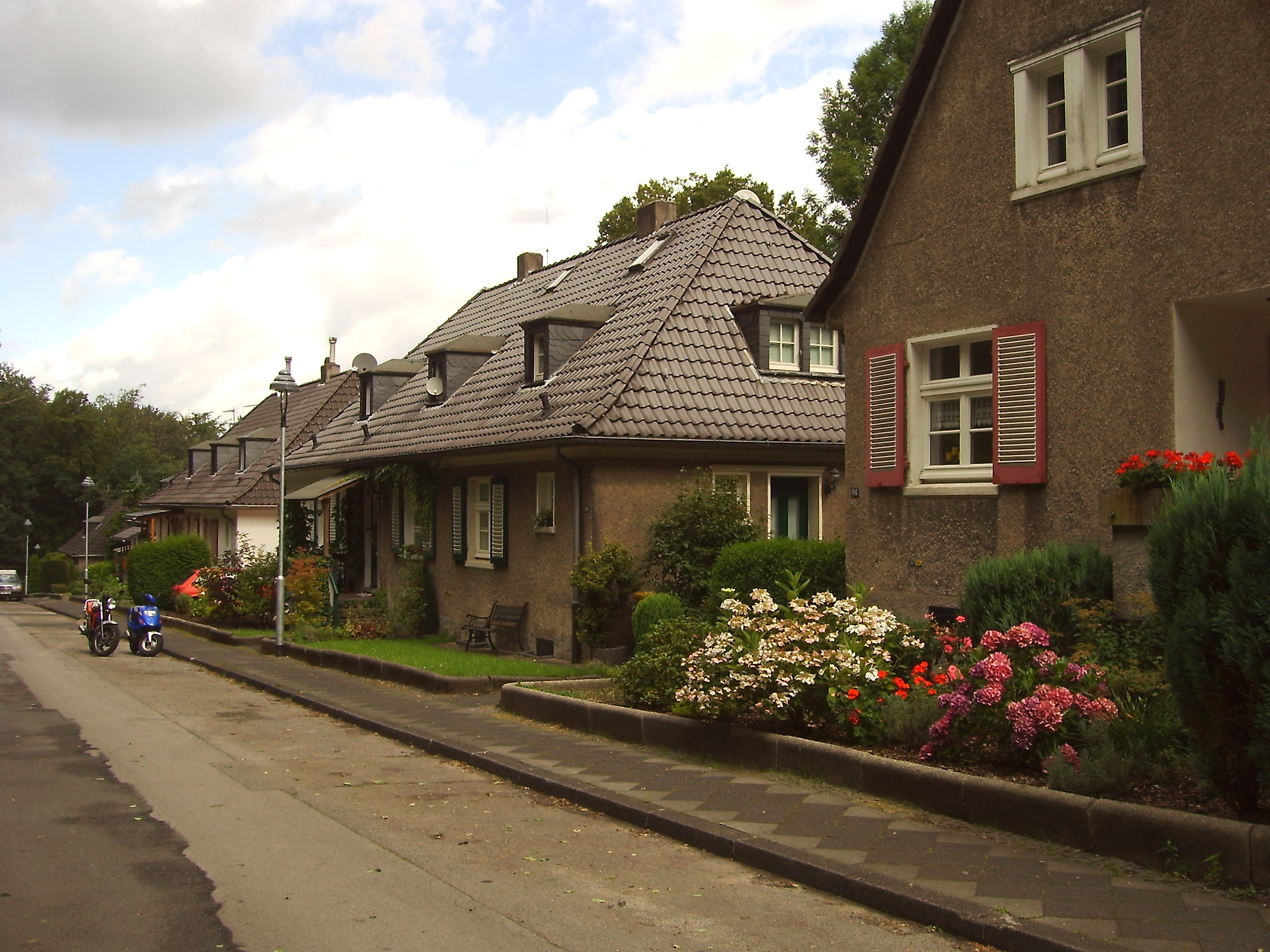 Krupp-Siedlung Altenhof II, Essen, Eichenstr., 2007